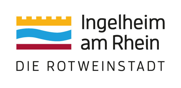 Überarbeitetes Logo der Stadt Ingelheim mit dem Slogan die Rotweinstadt